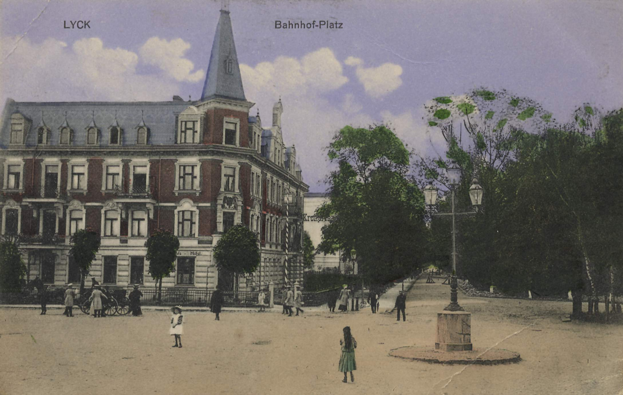 Bahnhofsplatz